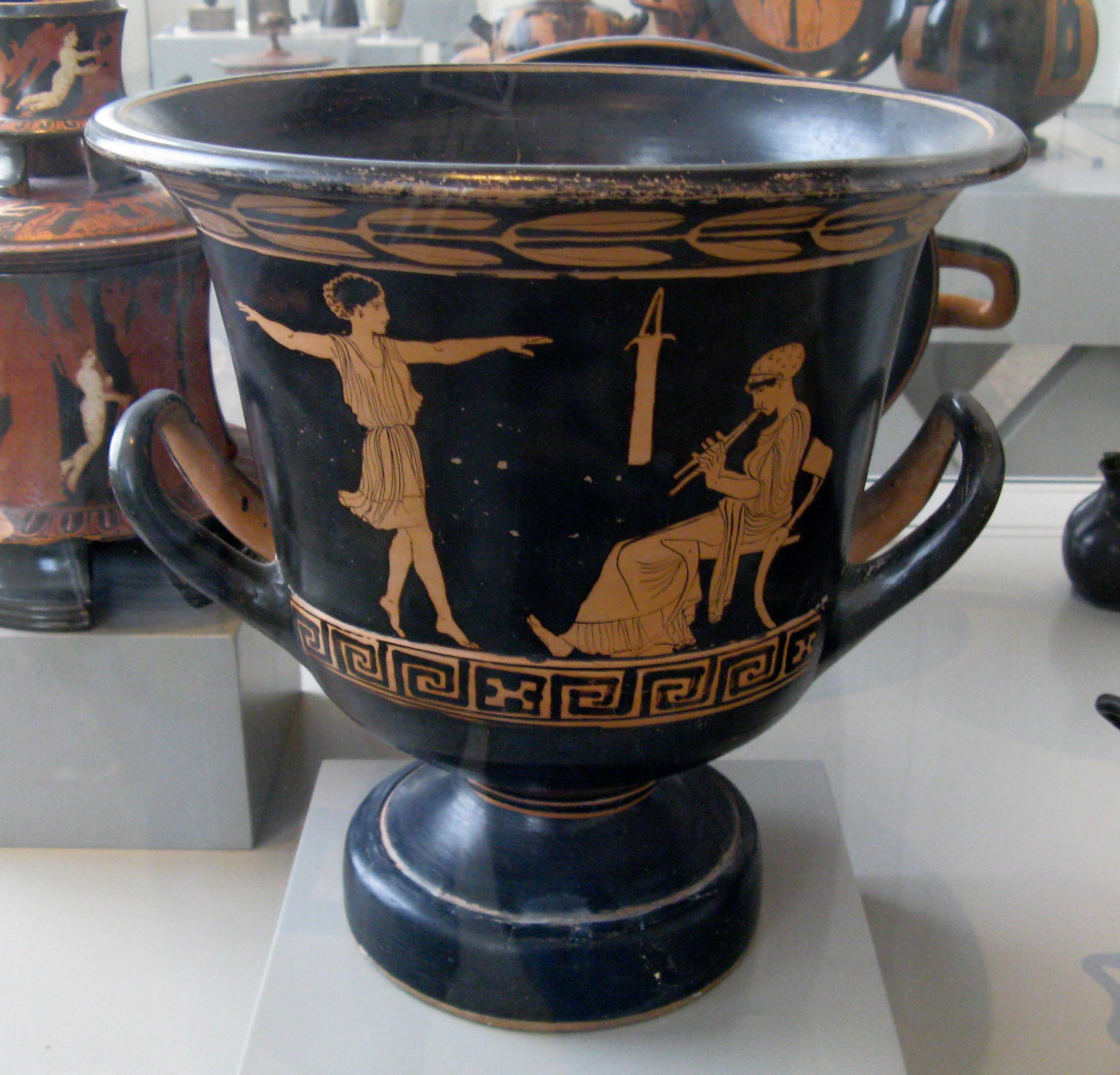 Ein Mädchen beim Tanzuntericht. Namenvase des Malers des tanzenden Mädchens in Berlin, auch Tänzerinnen-Maler, apulisch-rotfiguriger Glockenkrater, um 440/30 v. Chr., Antikensammlung Berlin/Altes Museum